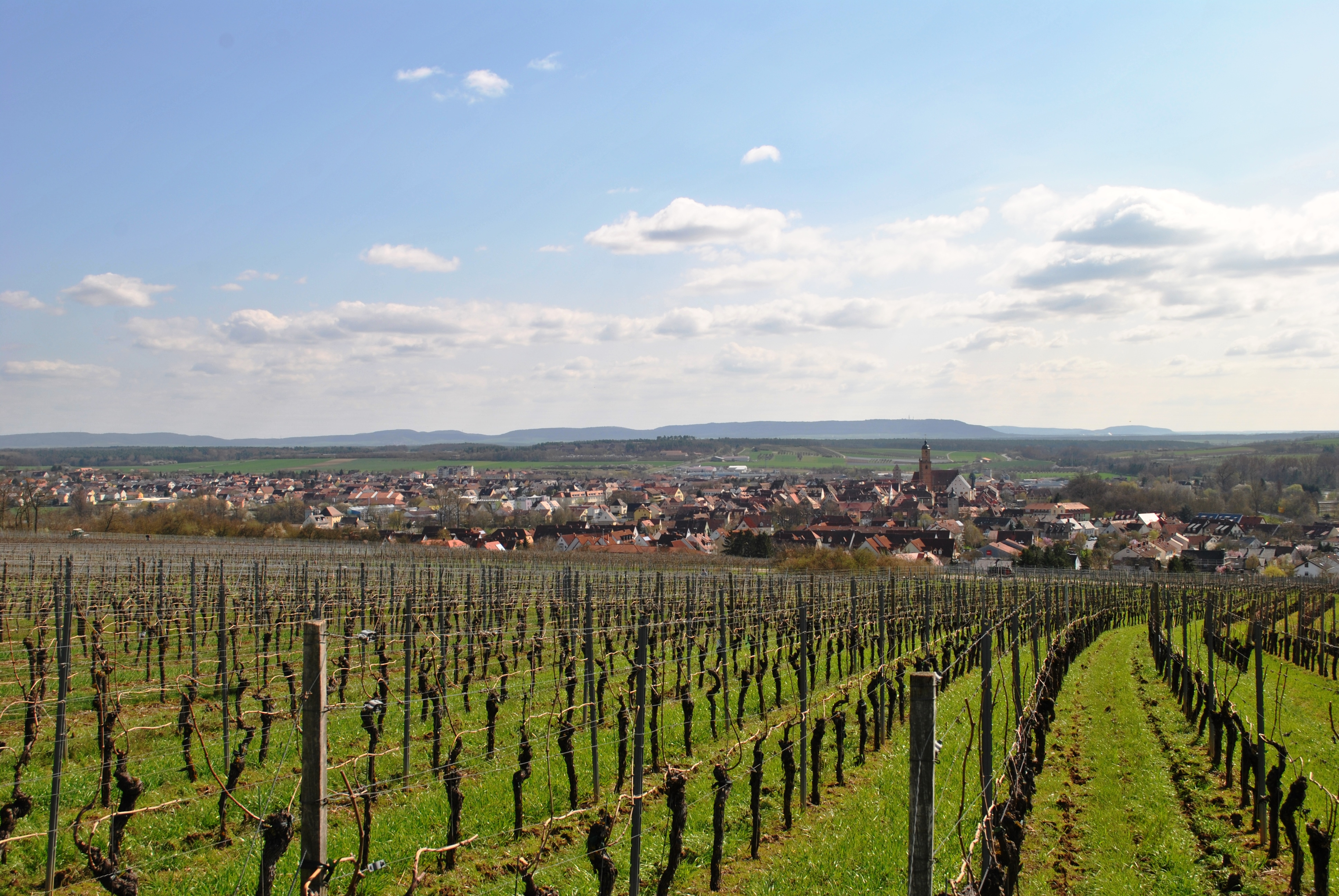 Panorama Volkach